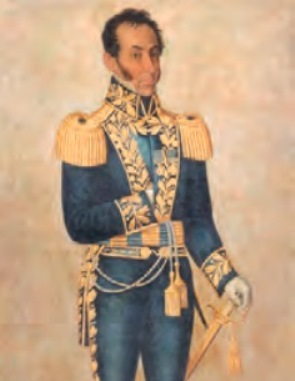 Detalle del retrato del general Vicente Aguirre, por Antonio Salas (1824). La pintura fue comisionada por Juan José Flores, entonces jefe de los Ejércitos del Distrito del Sur de la Gran Colombia (actual Ecuador), para decorar la gran galería de su Quinta El Placer en la ciudad de Quito. El cuadro es parte de una serie de 12 lienzos que retratan a los héroes de la Independencia ecuatoriana.